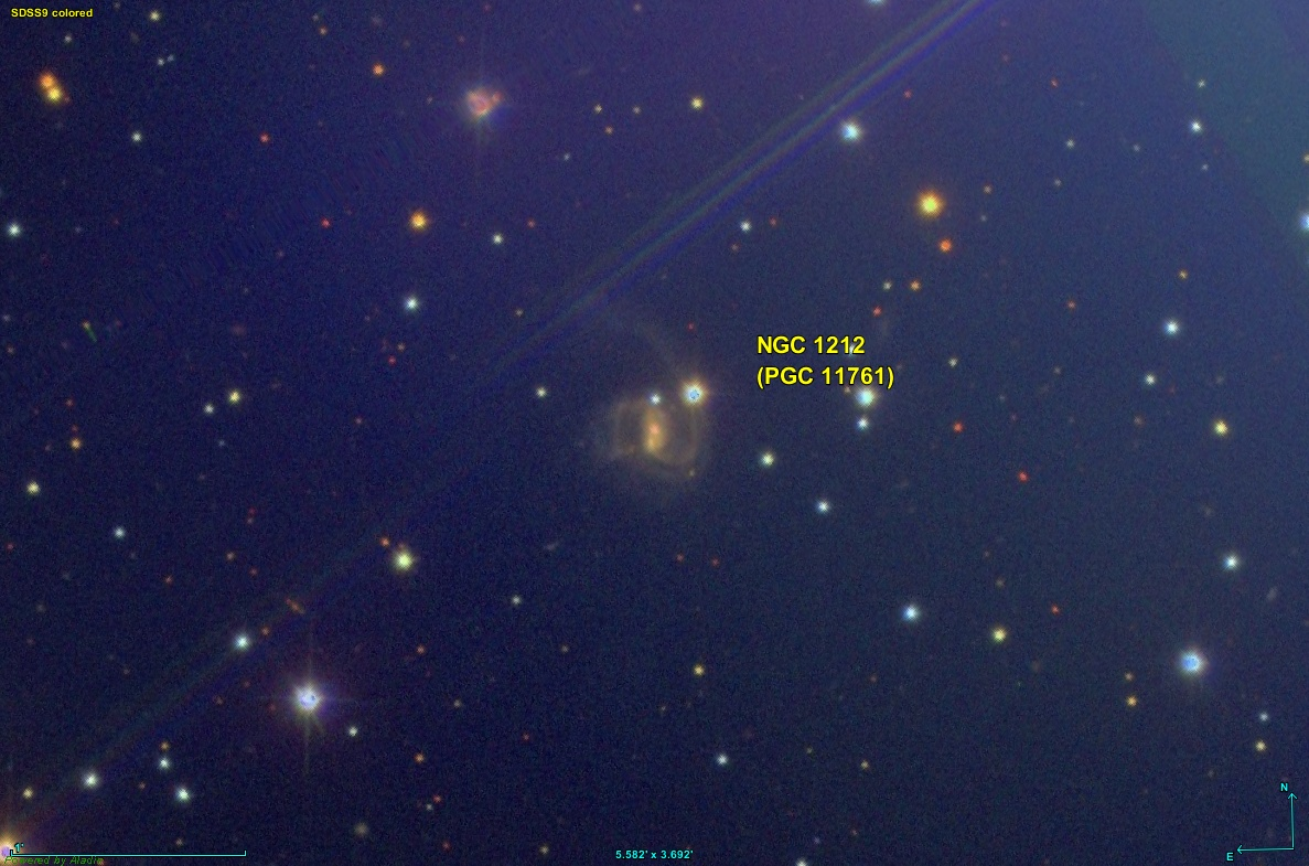 Image créée à l'aide du logiciel Aladin Sky Atlas du Centre de Données astronomiques de Strasbourg et des données de SDSS (Sloan Digital Sky Survey).